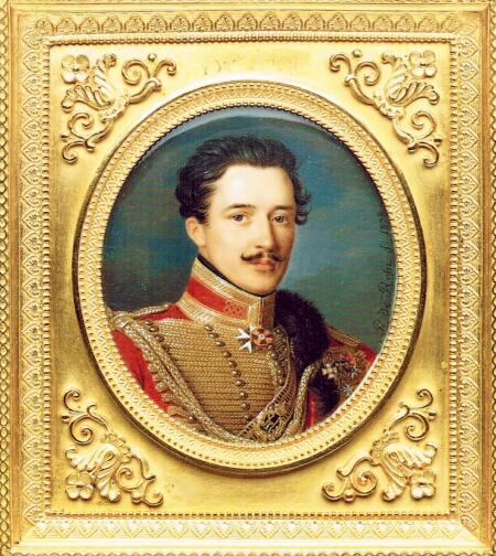 Алексей Яковлевич Лобанов Ростовский (1795 -1848)